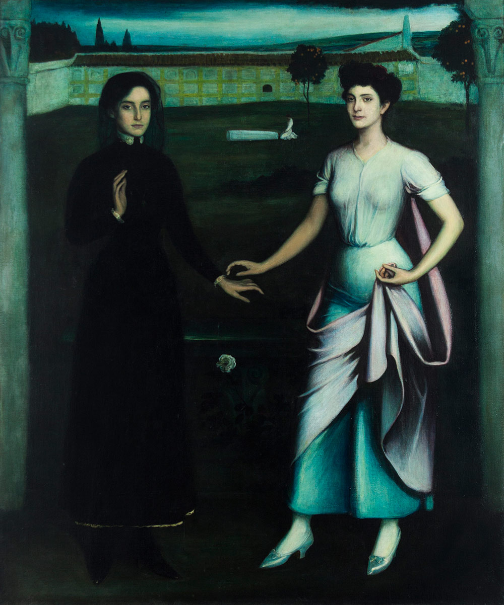 Amor sagrado, amor profano. 1908. Óleo sobre lienzo. 168 x 139 cm. Colección CajaSur.